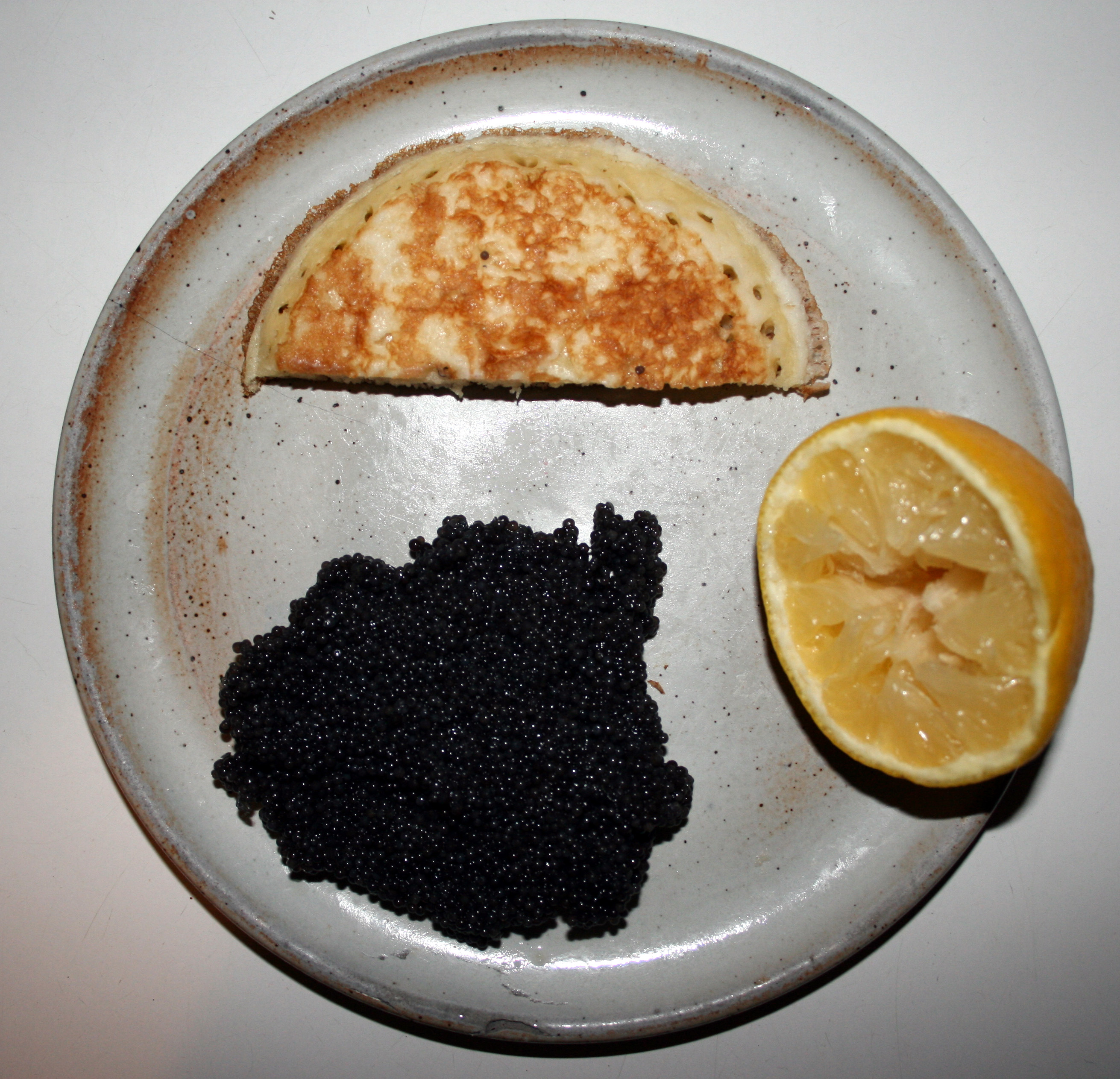 Assiette d'œufs de lompe